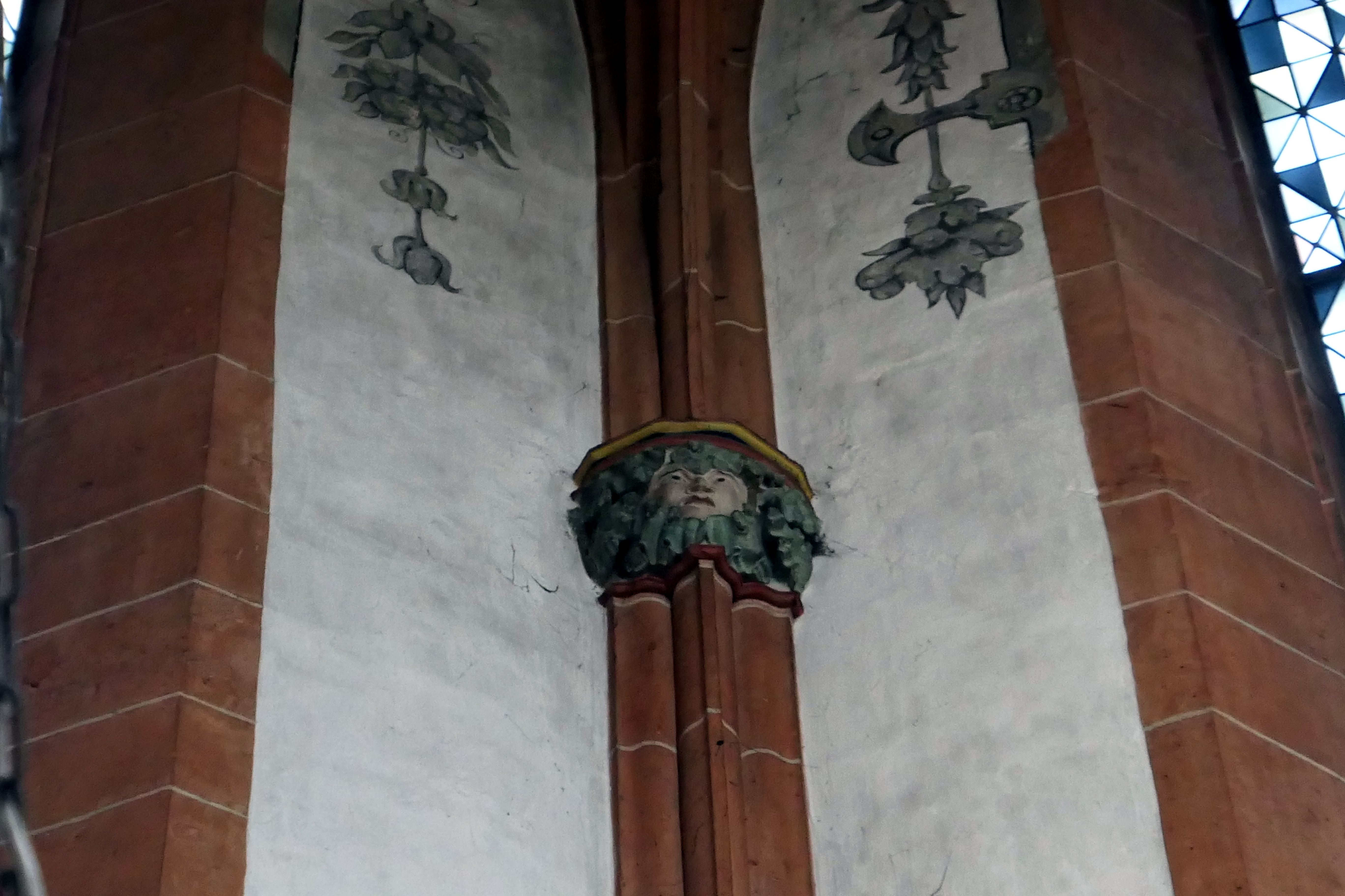 Kapitell mit Blattmaske Chor (Green man)